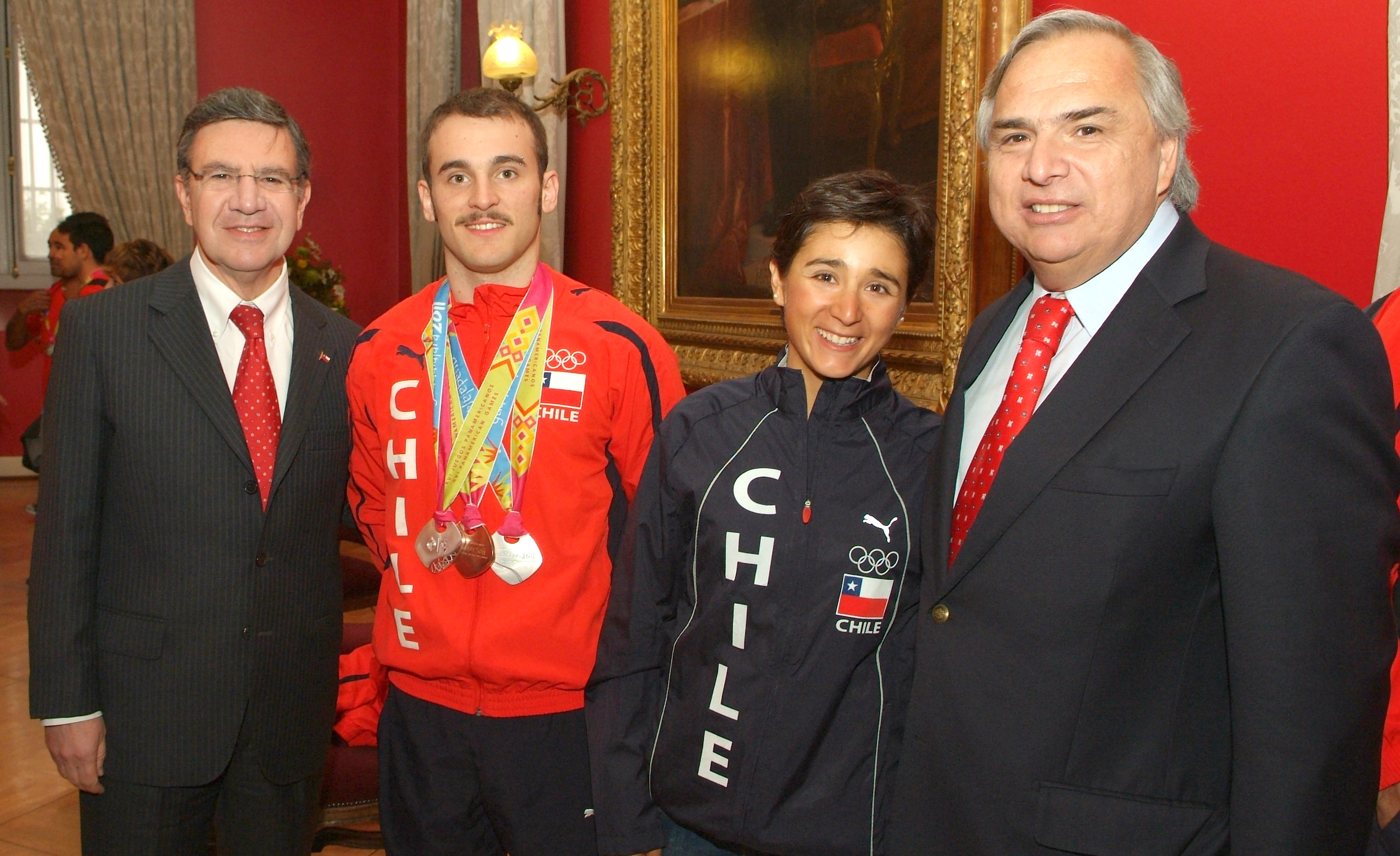 Delegación chilena que participó en los XVI Juegos Panamericanos y se firma el proyecto de ley que crea el Ministerio del Deporte.